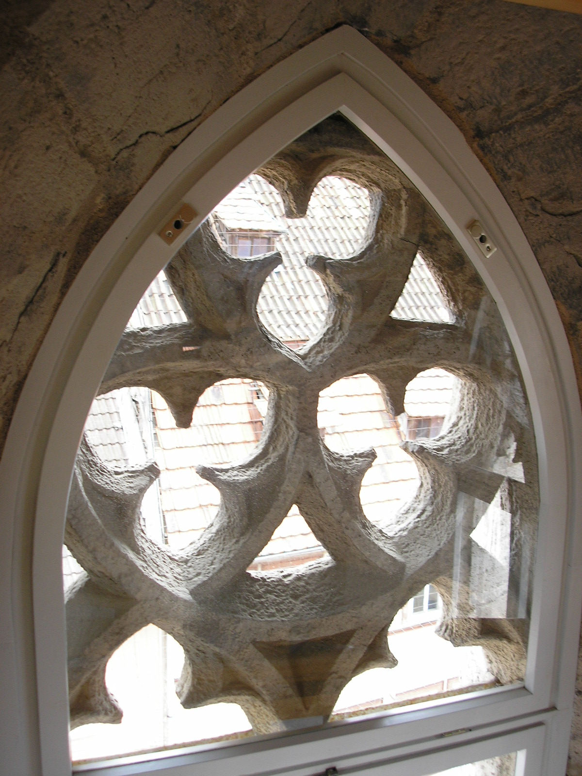 Ein gotisches Fenster im Klosterturm in Bad Langensalza (Thüringen)